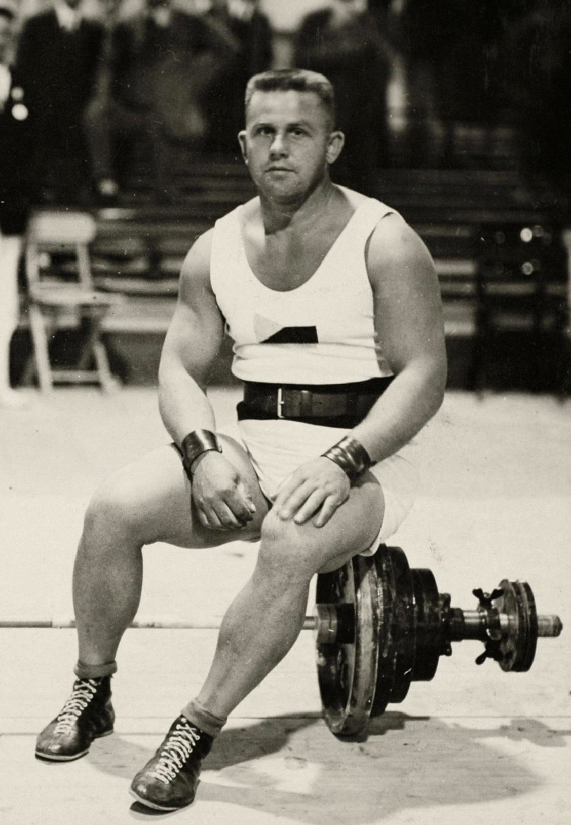 Olympische Spelen 1928. De Tsjechoslowaakse atleet Jaraslav Skobla (tsj-s) poseert bij het onderdeel gewichtheffen in de zwaargewichtklasse +82,5 kg.